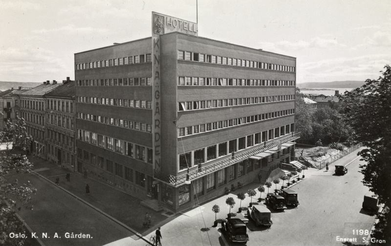 gateløp, K.N.A.-hotellet, biler, mennesker, bygårder. Fotografering:1935 (ca)Fotograf: ukjent personUtgiver/forlegger, sikker: S. Gran kortforlag.